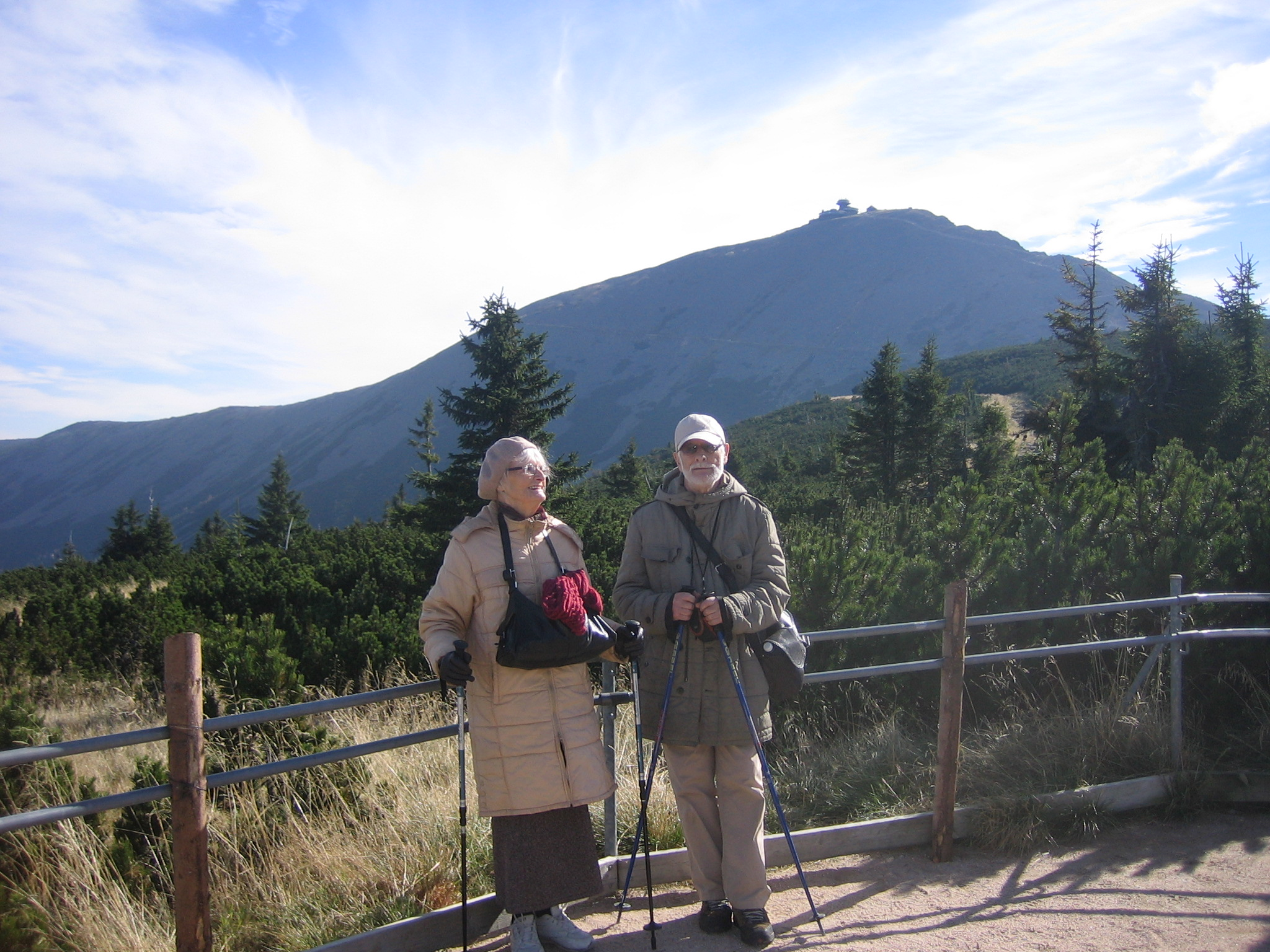 2013 w drodze na Śnieżkę